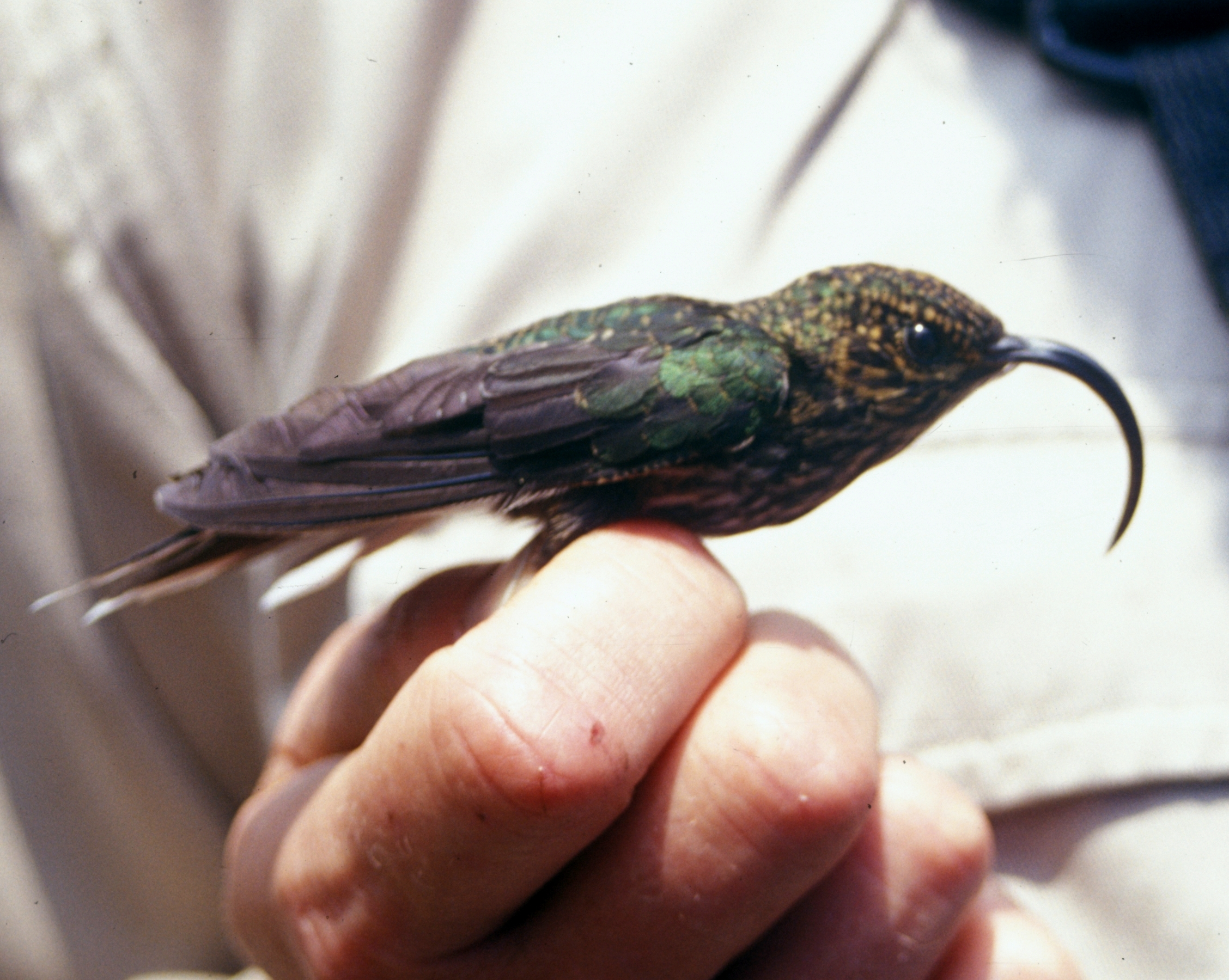 White-tipped Sicklebill (Eutoxeres aquila). Sub-adult from Cordillera del Cóndor, Ecuador.